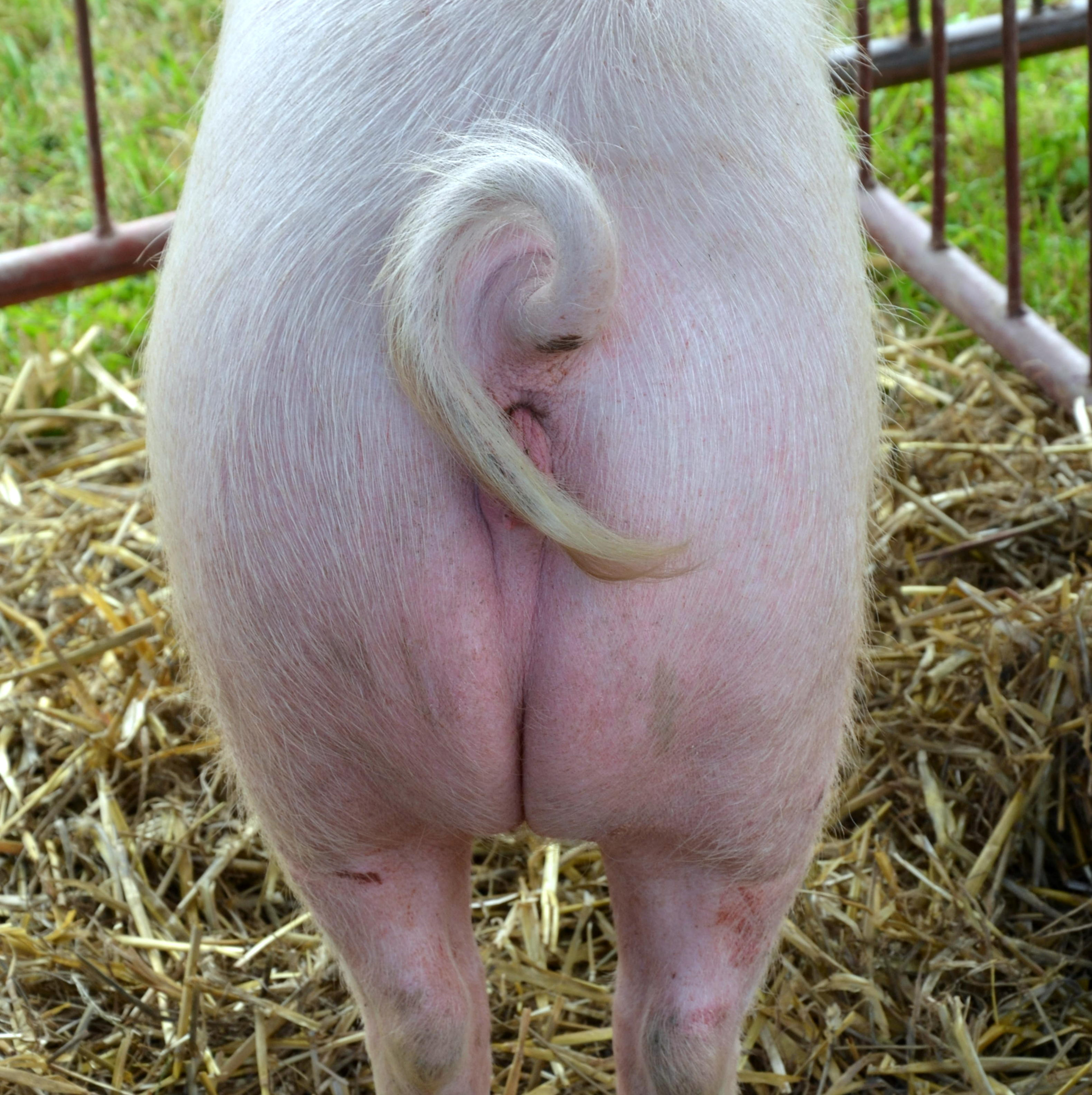 Schweine der polnischen Rasse "Złotnicka pstra"